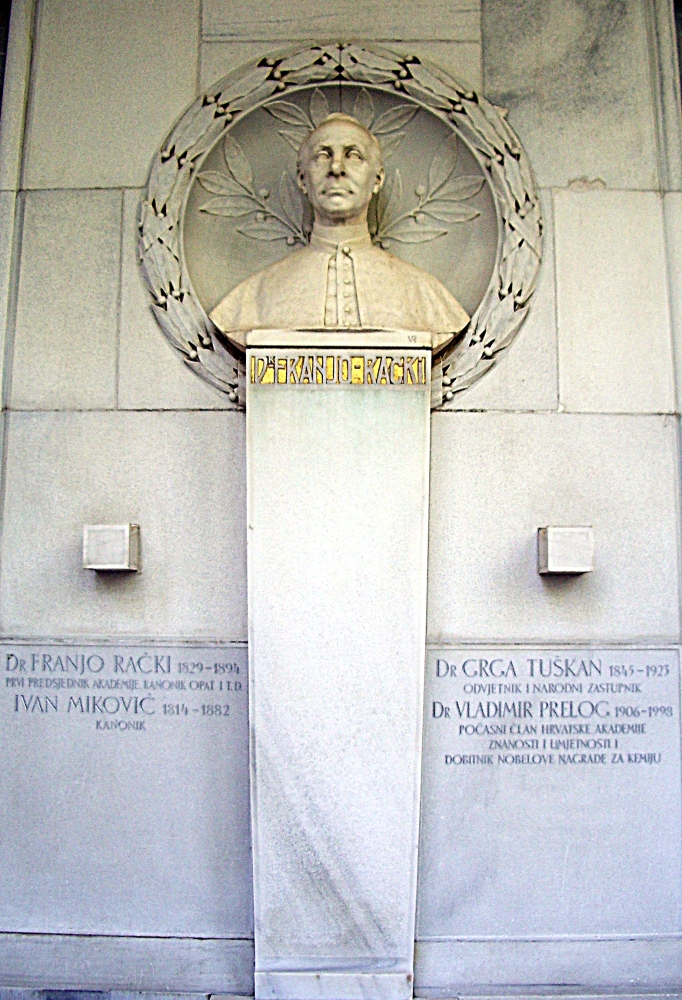 Spomenik Hrvatske akademije znanosti i umjetnosti Franji Račkom, Vladimiru Prelogu, Grgi Tuškanu i Ivanu Mikoviću na zagrebačkom Mirogoju